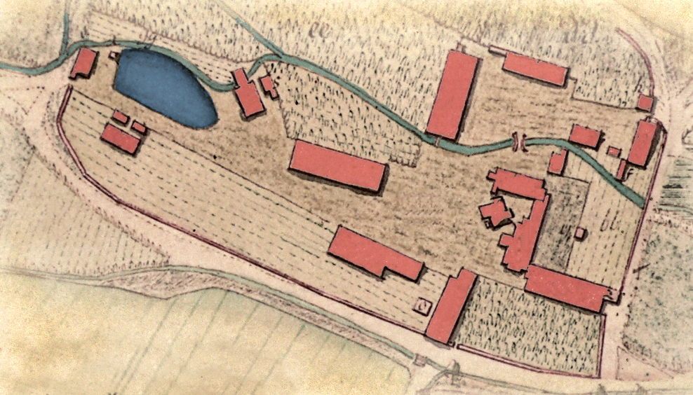 Plan von Kloster Wiebrechtshausen 1745